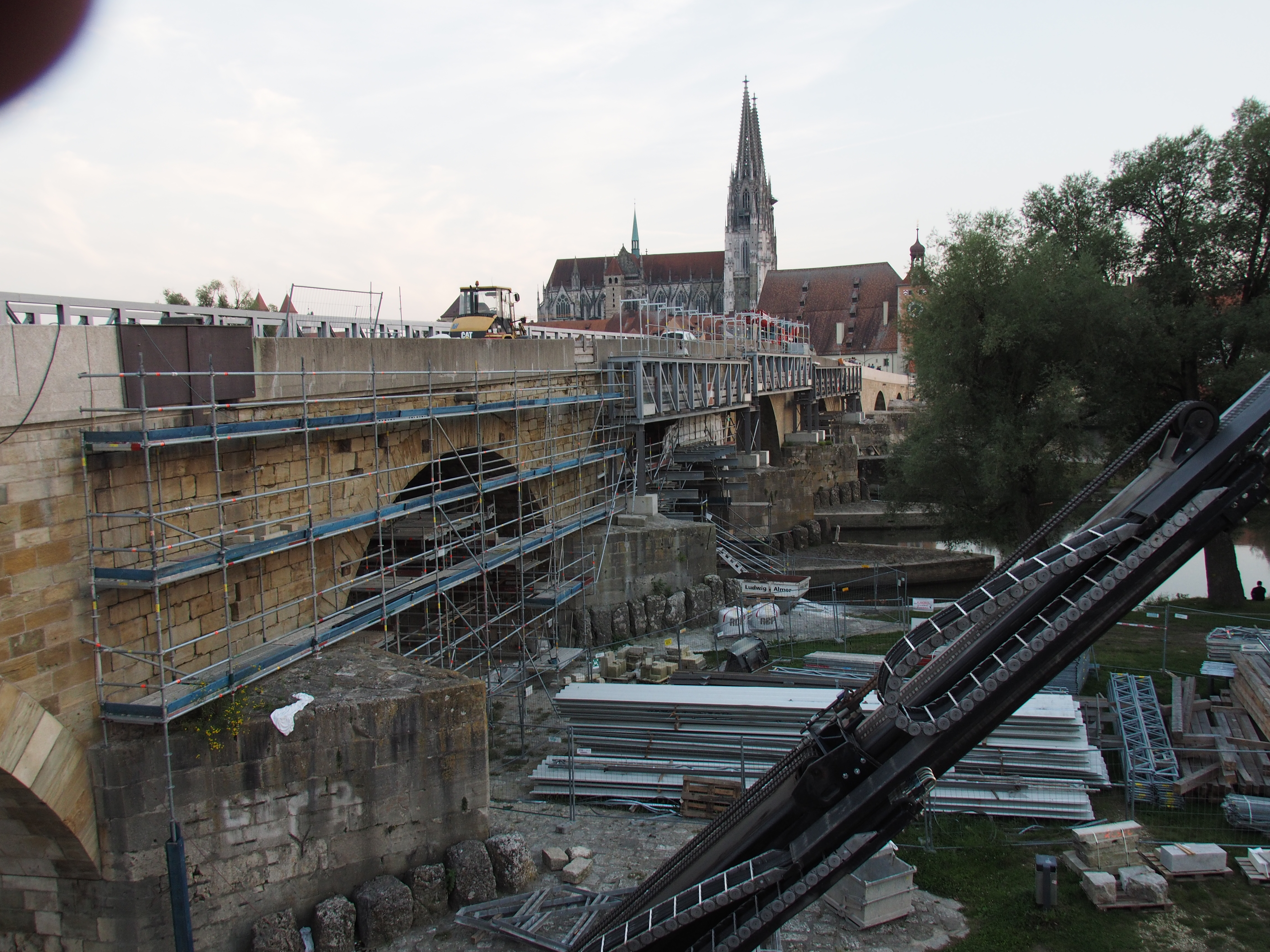 Sanierungsarbeiten September 2016 an der Steinernen Brücke in Regensburg